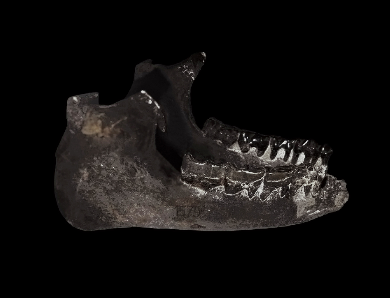 Babes Bolyai paleontology museum